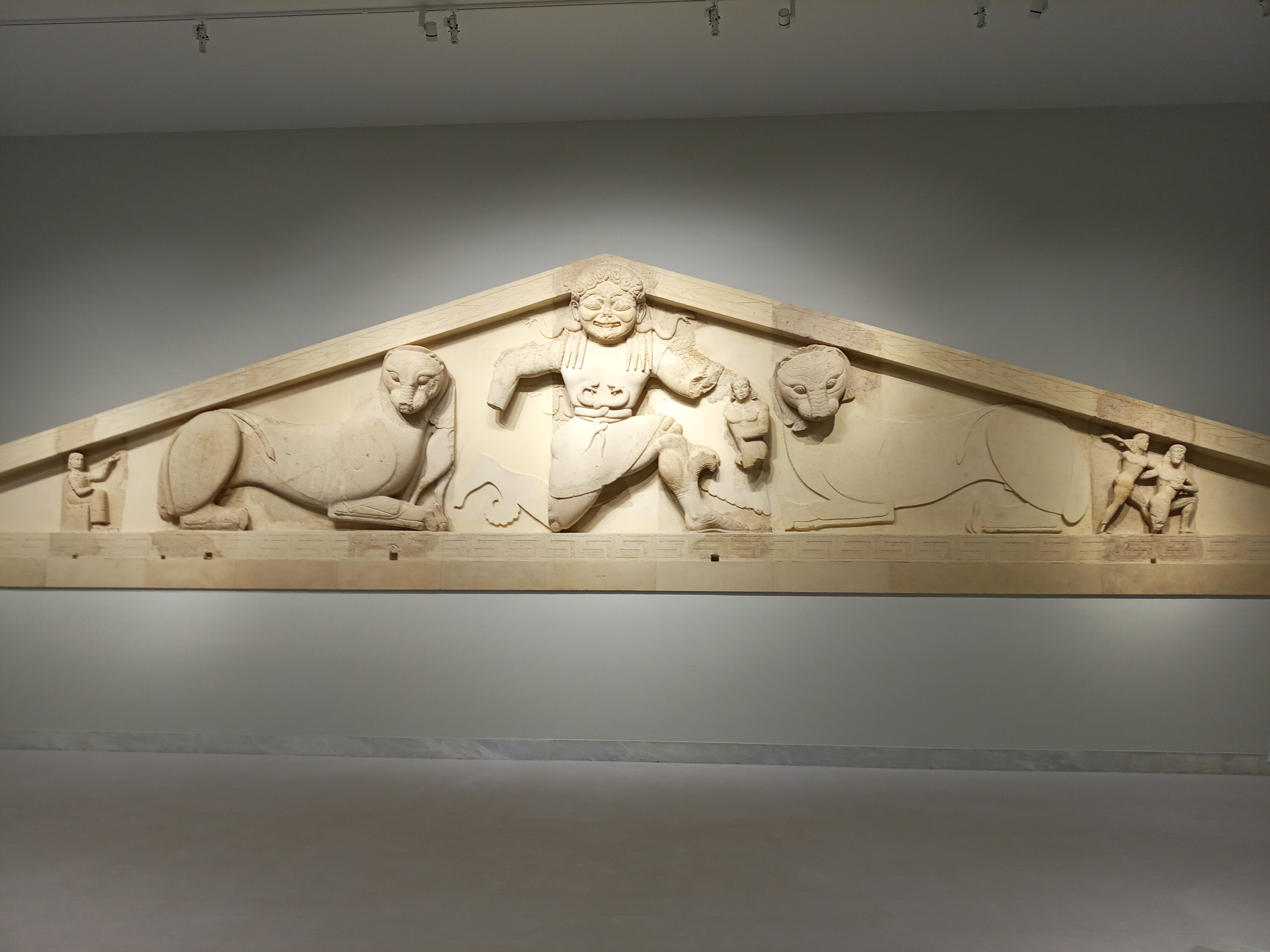 Горгона храм Артеміди Корфу